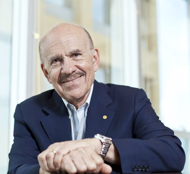 SÃO PAULO, SP, BRASIL, 04-04-2013, 11h00: Louis Ignarro, premio Nobel de Medicina em 1998. (Foto: Zé Carlos Barretta/Folhapress CIENCIA)